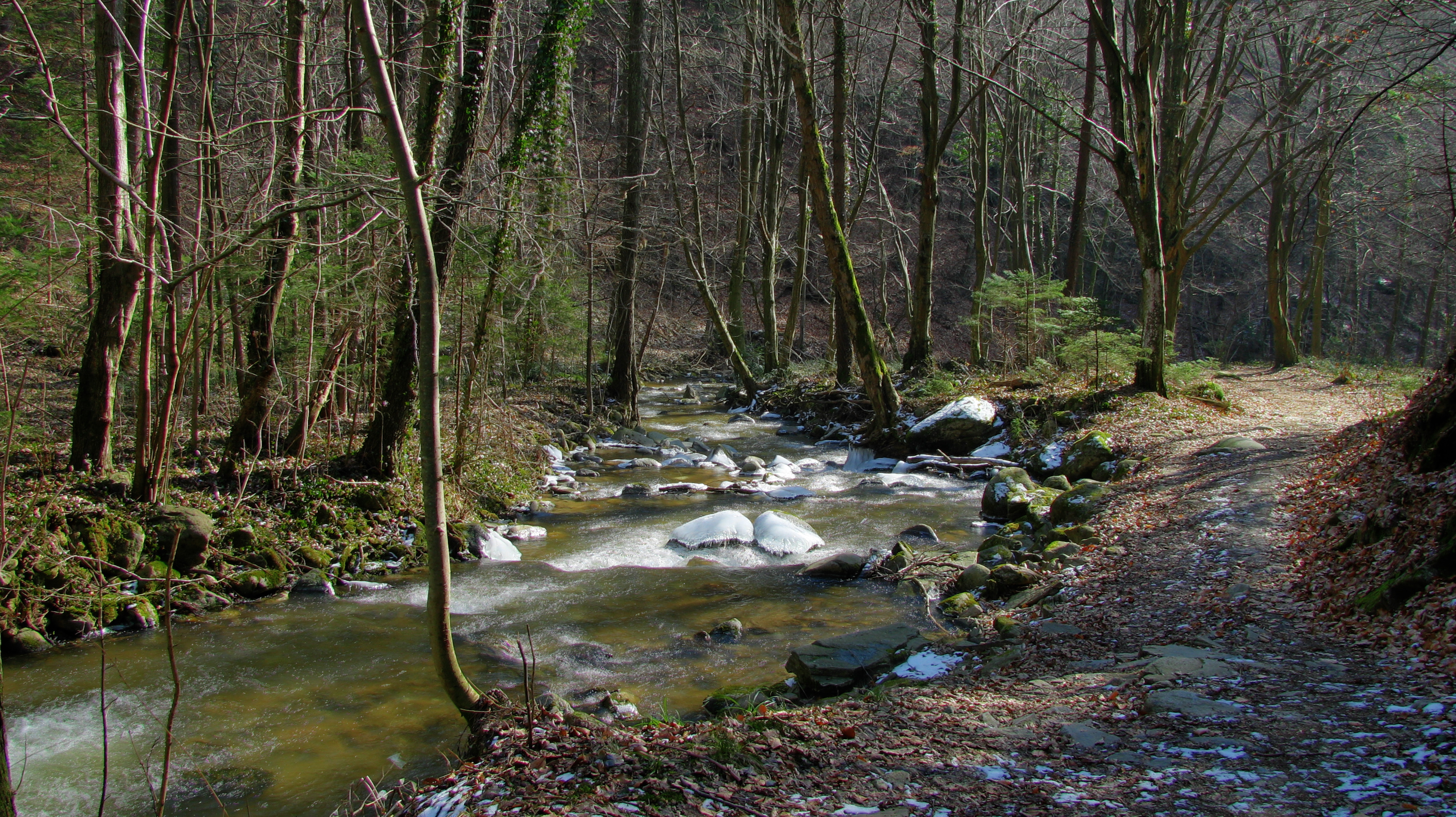 Bistriški Vintgar